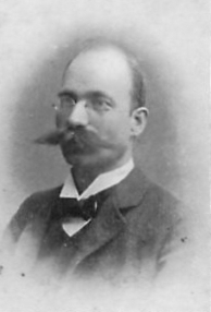 P. Nylén, L. K., konata verkinto de lernolibroj kaj vortaroj Sved-Esp., estinta redaktoro de "Lingvo Internacia".